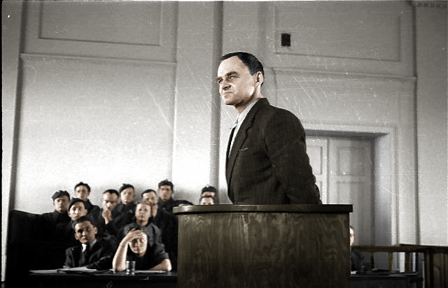 Witold Pilecki w trakcie procesu